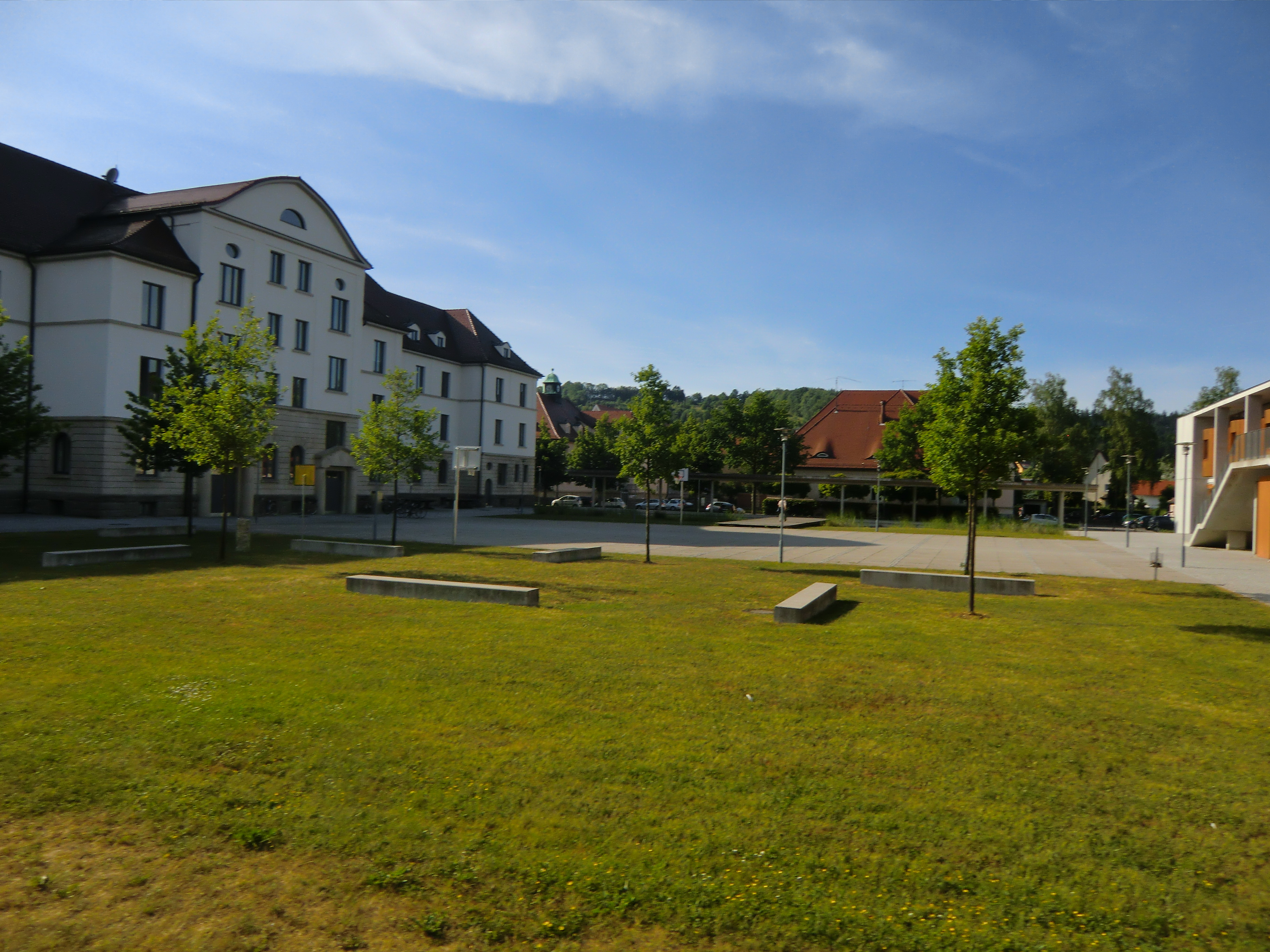 Blick auf das Campusgebäude des Landesgymnasiums